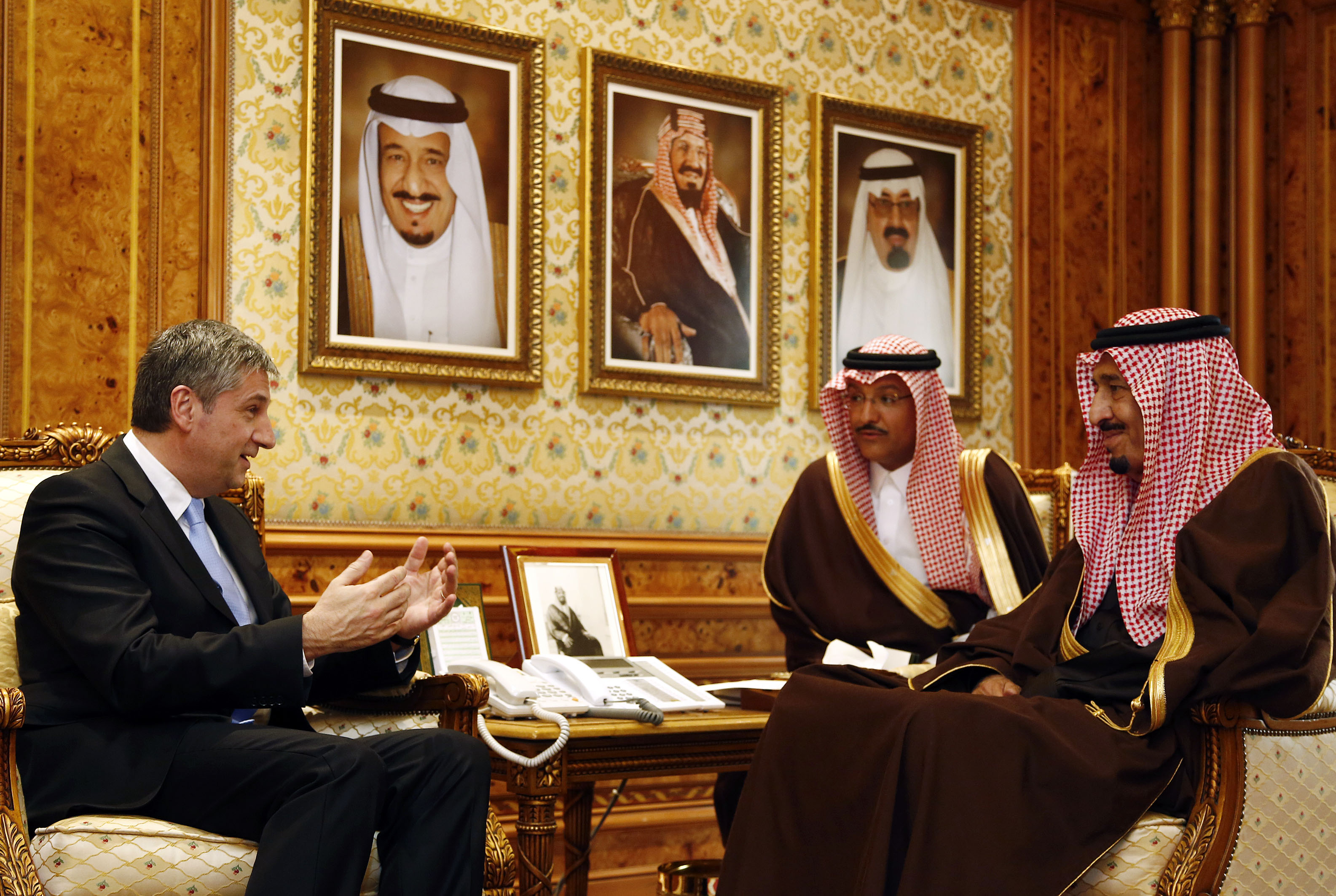 Aussenminister Michael Spindelegger besucht im Rahmen seiner Saudi Arabien Reise die Stadt Riad, im Gespräch mit Kronprinz Salman. Saudi Arabien, 12.02.2013, Foto: Dragan Tatic